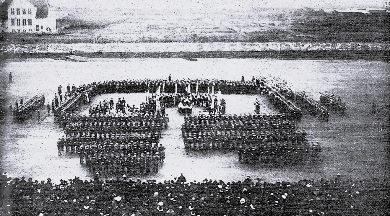 Ansprache Pastor Mildensteins zur Fahnenweihe auf dem Hof der Alten Kaserne. In der Mitte steht ein Rednerpult. Im Hintergrund befindet sich unter der Ziegelstraße 6 die II. Haushaltungsschule. Die Anschrift des Gebäudes ist heute An der Stadtfreiheit 1.